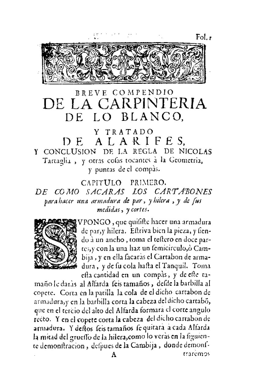 Breve compendio de la carpinteria de lo blanco y tratado de alarifes, con la conclusion de la regla de Nicolas Tartaglia, y otras cosas tocantes a la geometria, y puntas del compas ... por Diego Lopez de Arenas .... - En Sevilla : por Manuel de la Puerta impressor de la Universidad, en las Siete Rebueltas. : a costa de Manuel Angel Xuarez, mercader de libros, en los Papeleros; vendese en su casa, 1727. - 2 parti ([8], 126, [2] p.; [4], 16 p.) : ill., ritratto, 2° - Tit. della pt. 2: Suplemento o Adiciones a el Compendio de la carpinteria de lo blanco di Rodríguez de Villafaņe, Santiago .